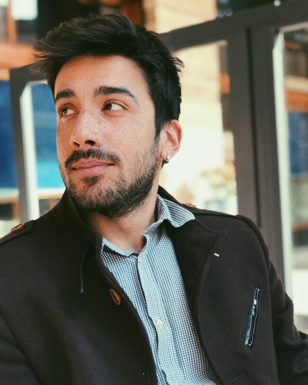 Edwyn Roberts